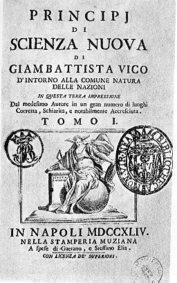 Giovambattista Vico, Principj di Scienza Nuova - copertina dell'edizione 1744